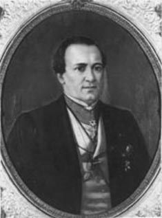 Obra da coleção Brasiliana Iconográfica.